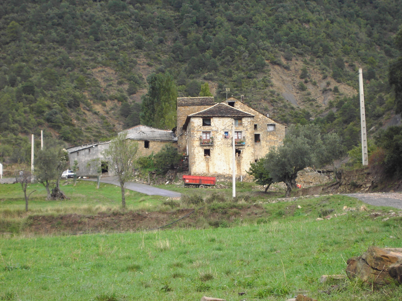 Uno de los tres barrios que forman la aldea de Lascorz, en el municipio altoaragonés de Foradada del Toscar, dentro de la cubeta natural de La Fueva. El de la imagen es el conocido como vico d'a Torre o barrio d'a Torre (literalmente «barrio de la Torre») por el torreón defensivo perteneciente a Casa Pardina que destaca sobre los tejados de la agrupación. Lascorz es una aldea que posee un caserío disperso: varias de sus casas se encuentran separadas unas de otras varias docenas de metros, formando grosso modo 3 barrios diferenciables. La iglesia está en el más bajo de los tres y se sitúa en una explanación redondeada que, de acuerdo con algunos autores, es lo único que queda del castillo que al menos hasta el siglo XVI poseía la localidad.